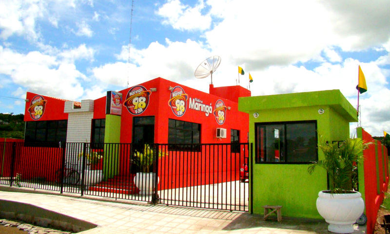 Nova sede da rádio 98 Maringá FM da cidade de Pombal